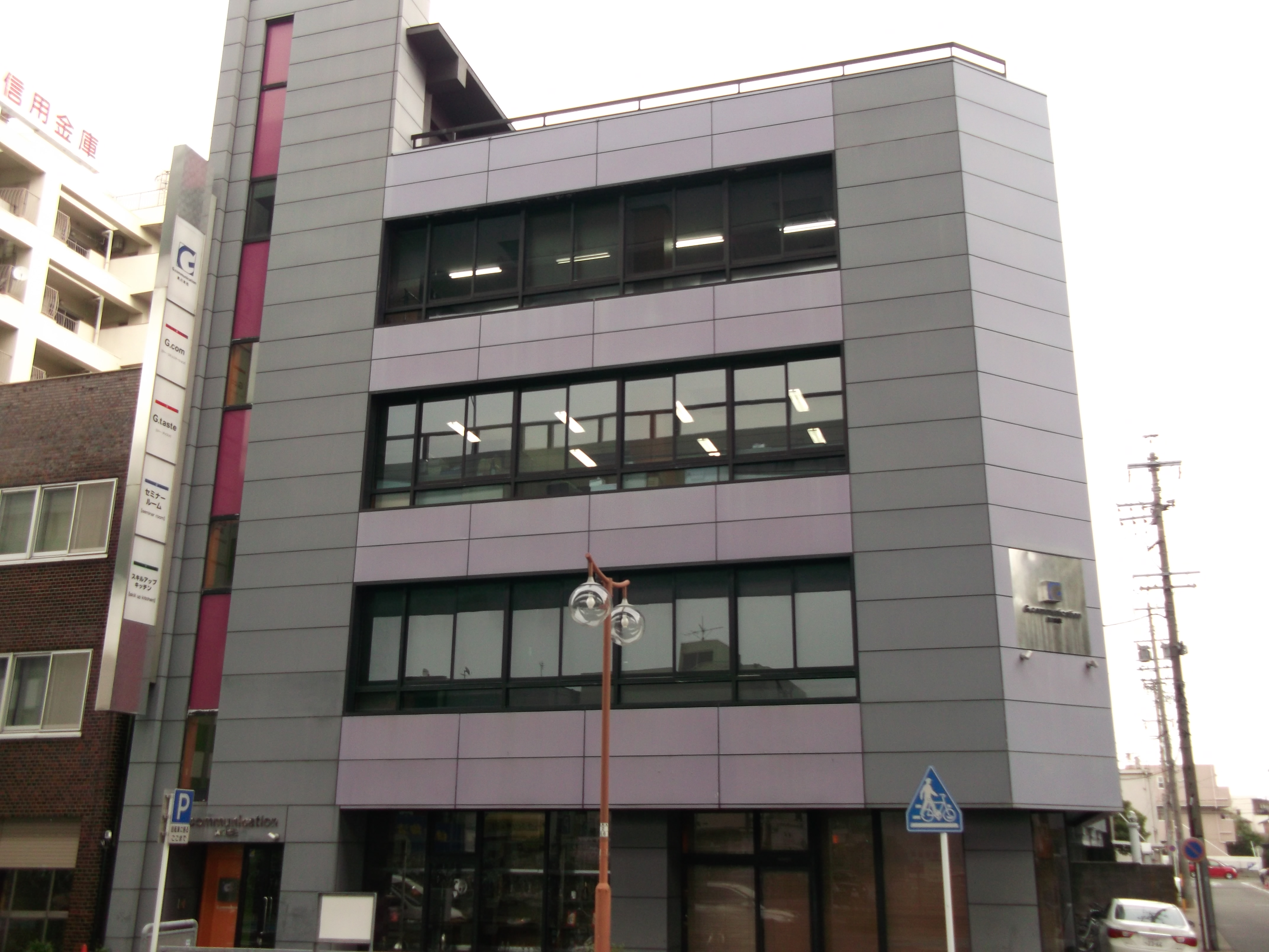 名古屋市北区黒川本通に所在するジー・コミュニケーション社所有のビル